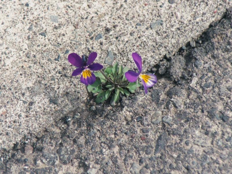 Violette, variété sauvage. Photographie numérisée à partir d'une pellicule argentique, image originale retaillée avec le Gimp. La photographie a été prise dans le port de Grenivík, en Islande.